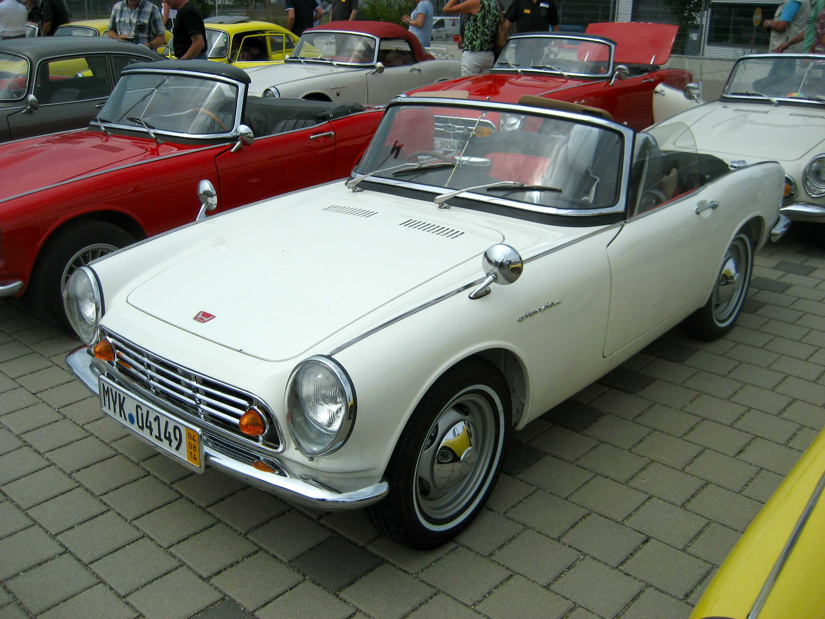 Honda S500 offen